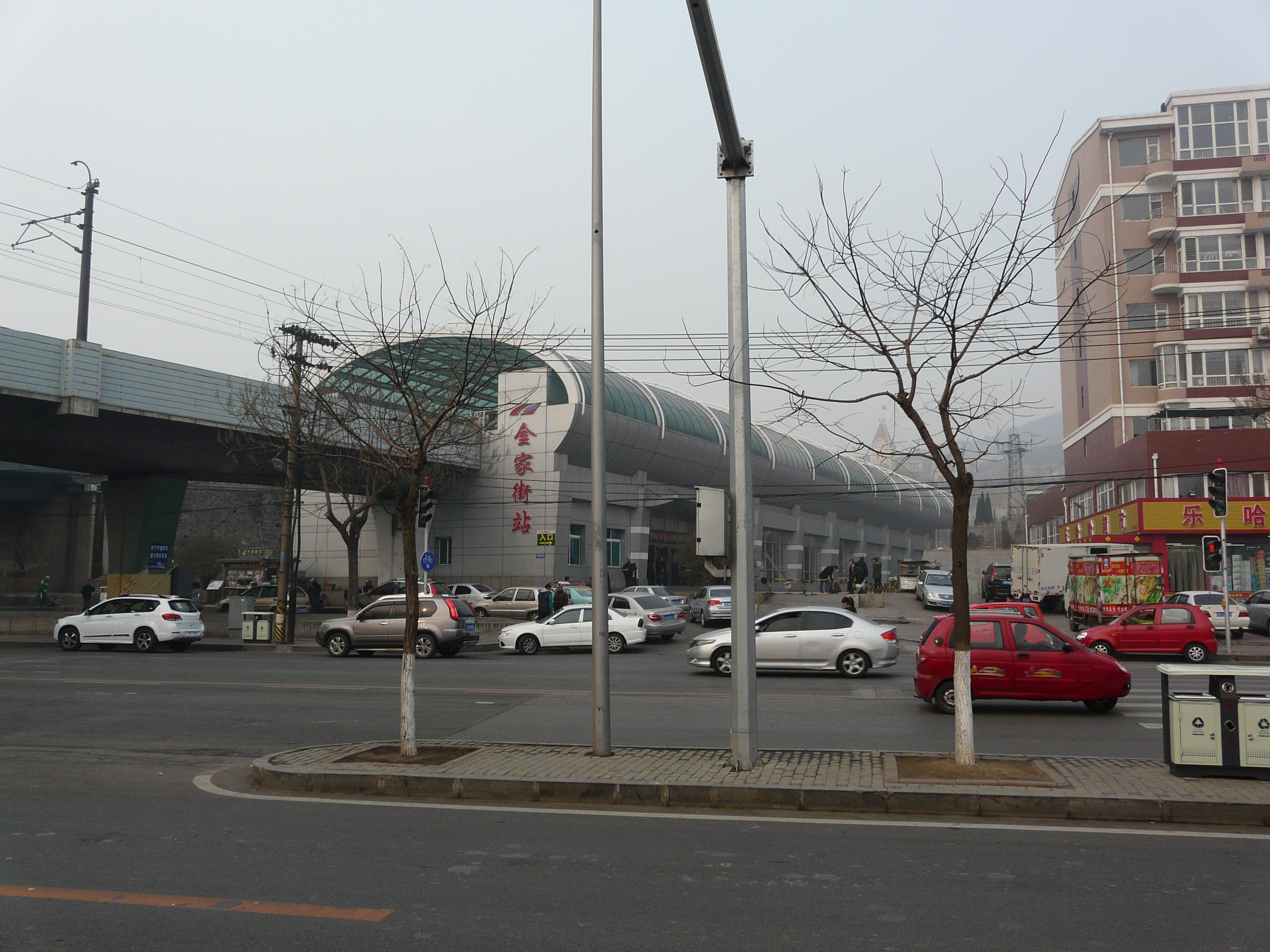 大连快轨3号线 金家街站